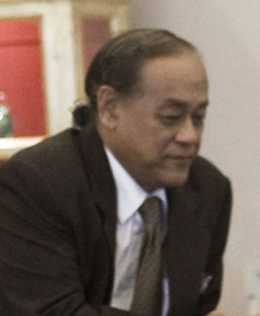 นายพิภพ ธงไชย แกนนำพันธมิตรฯ เข้ายื่นหนังสือต่อนายกรัฐมนตรีขอให้ยกเลิกแผนที่แสดงเขตแดนระหว่างไทย -กัมพูชา มาตราส่วน 1:200,000 ที่จัดทำขึ้นโดยคณะกรรมการฝรั่งเศสแต่เพียงฝ่ายเดียว ณ ห้องสีม่วง ตึกไทยคู่ฟ้า ทำเนียบรัฐบาล 9พฤศจิกายน2552 (The Official Site of The Prime Minister of Thailand Photo by พีรพัฒน์ วิมลรังครัตน์)